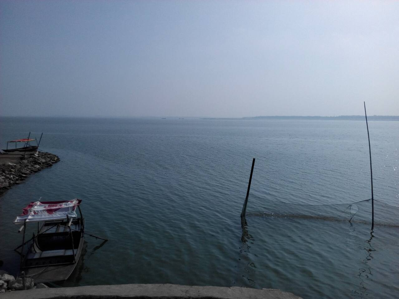 在大安山拍摄的东平湖